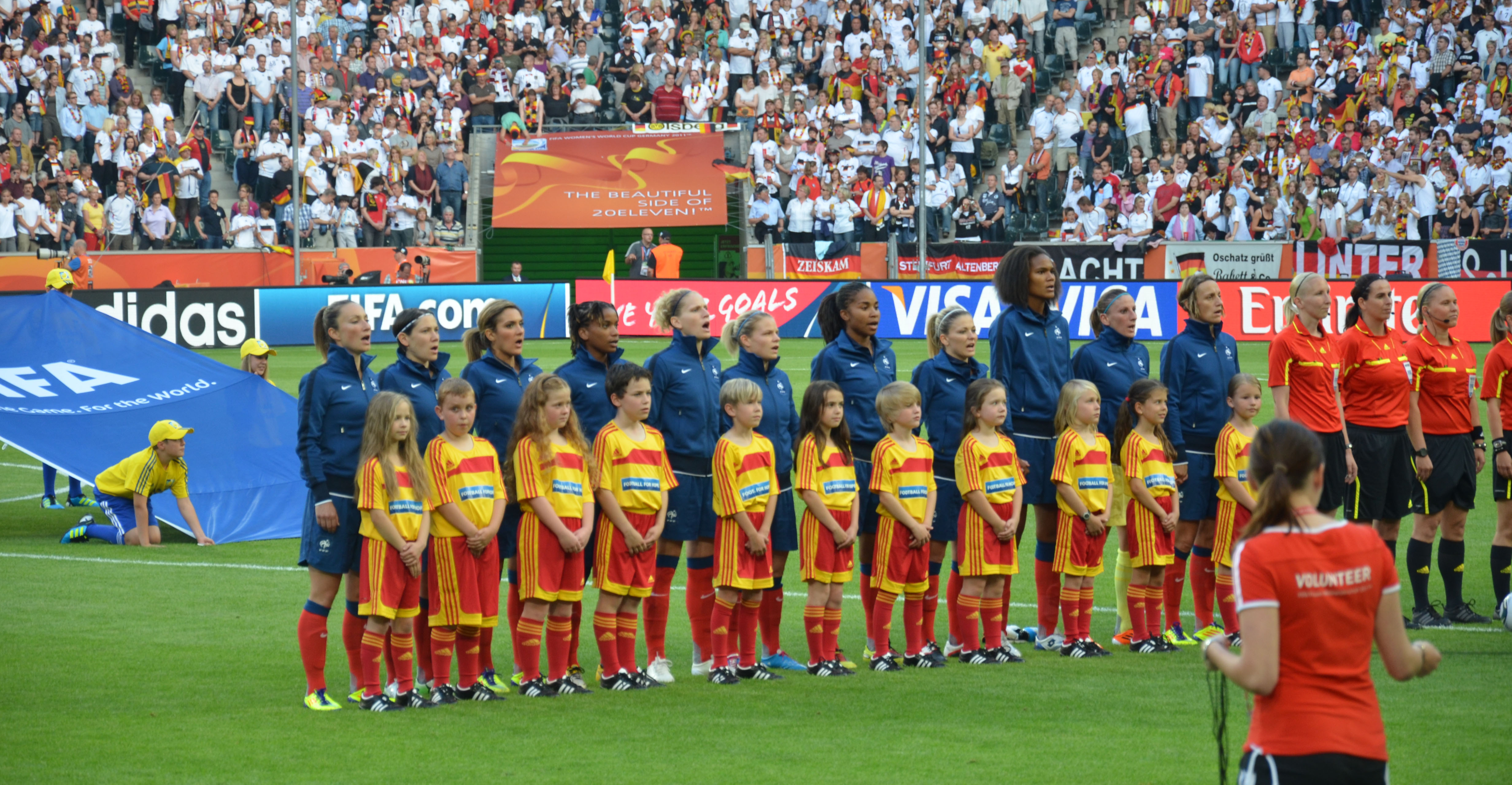 WM Vorrundenspiel zwischen Frankreich und Deutschland am 5. Juli 2011 im Borussiapark in Mönchengladbach (von links nach rechts): 17 Gaëtane Thiney, 15 Élise Bussaglia, 14 Louisa Nécib, 12 Élodie Thomis, 11 Laure Lepailleur, 9 Eugénie Le Sommer, 4 Laura Georges, 3 Laure Boulleau, 2 Wendie Renard, 16 Bérangère Sapowicz, 6 Sandrine Soubeyrand